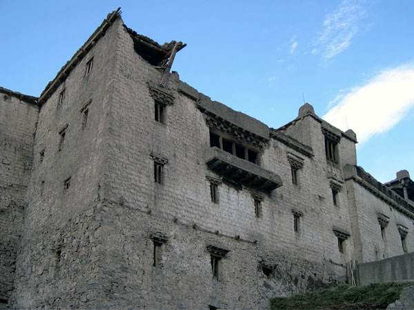 Alchi, Ladakh, India